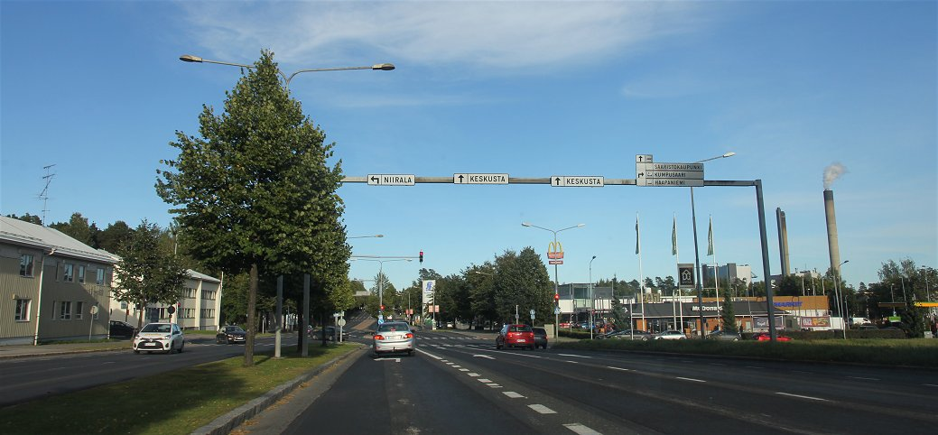 Tasavallankatua Kuopion Haapaniemellä Siikaniemenkadun (risteys vasemalle) ja Saaristokadun (risteys oikealle) risteystä lähestyttäessä.